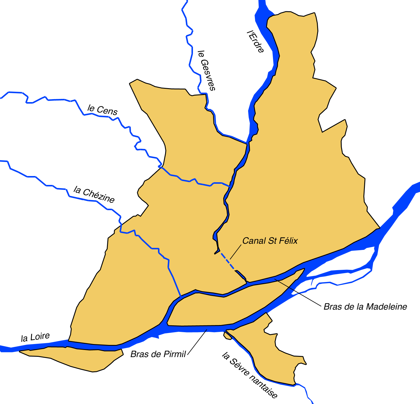 Réseau hydrographique de Nantes, France.